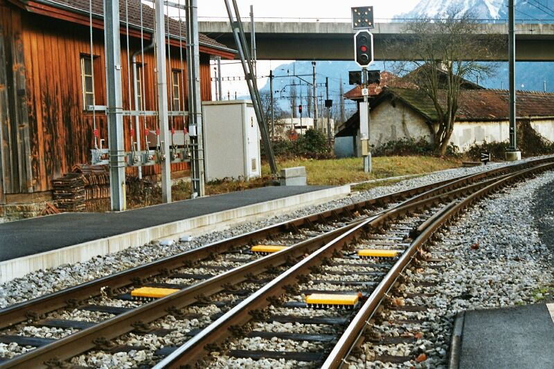 Eurobalisen für ZSI-127 im Meterspurgleis der BOB in Interlaken Ost